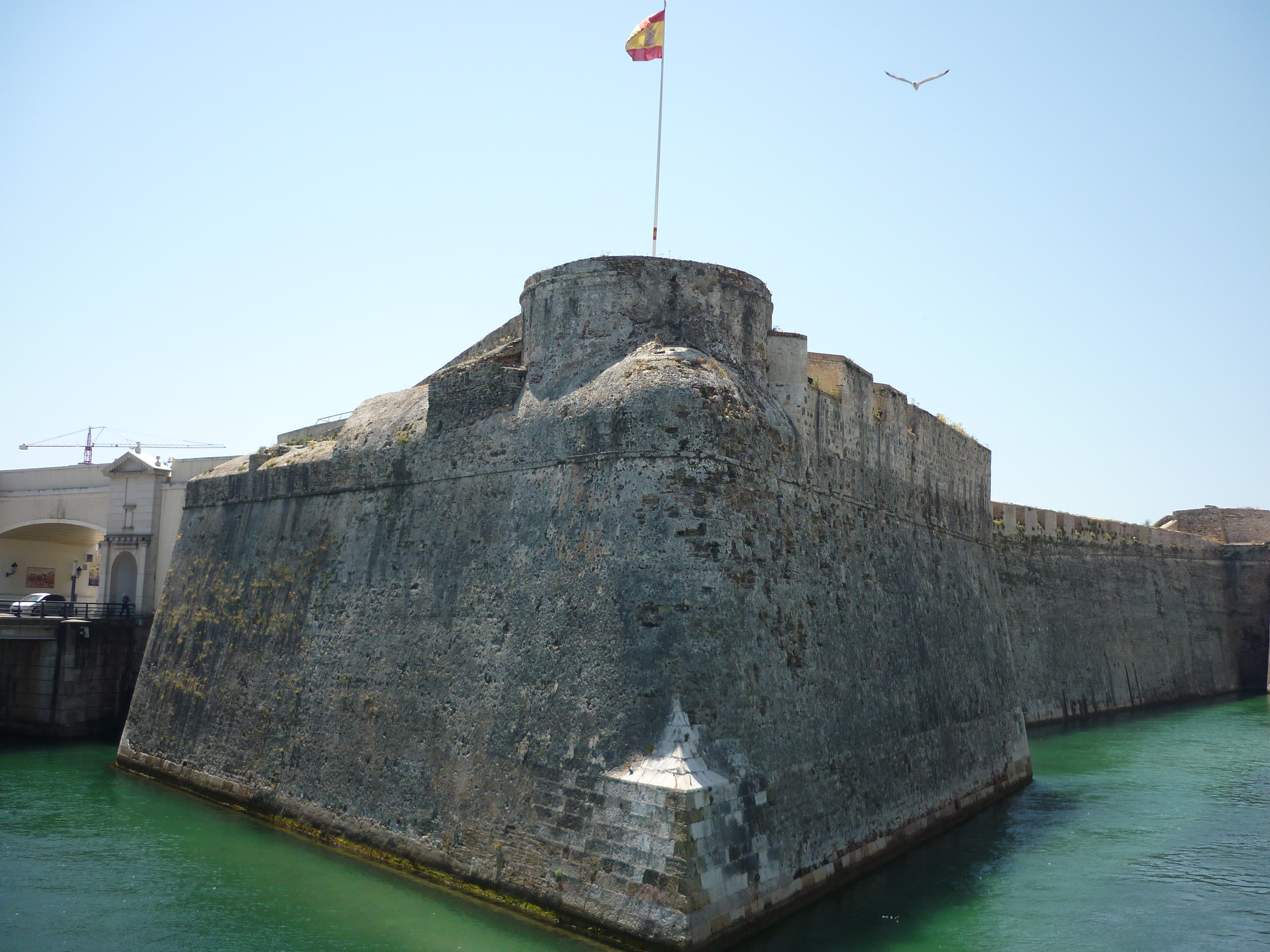 Fotografías de Cañete